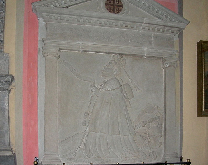 Беларуская (тарашкевіца): Комплекс былога кляштара езуітаў:касьцёл Божага Цела з дэкаратыўным аздабленьнем:росьпісы ў інтэр’еры, выкананыя пад кіраўніцтвам К. Д. Гескага; алтарная карціна «Тайная вячэра» К. Д. Гескага;надмагільныя помнікі і барэльефы: Мікалая Крыштапа Радзівіла Сіроткі, Канстантына Радзівіла, Эльжбеты Яўфіміі Радзівіл, Крыштапа Радзівіла, Ігната Мураўскага, Канстанцыі Радзівіл, Людвіка Кандратовіча (У. Сыракомля);скульптуры на галоўным фасадзе:Сьв. Крыштапа, Сьв. Мікалая, Сьв. Францішка Ксаверыя, Ігнація Лаёлы;пахавальная крыпта роду Радзівілаў (70 трун-саркафагаў, канопа і урна з прахам);вежа;капліца Булгарына;агароджа з брамай. г. Нясьвіж This is a photo of Belarusian heritage monument. Reference number: 610Г000465 ( WLM)